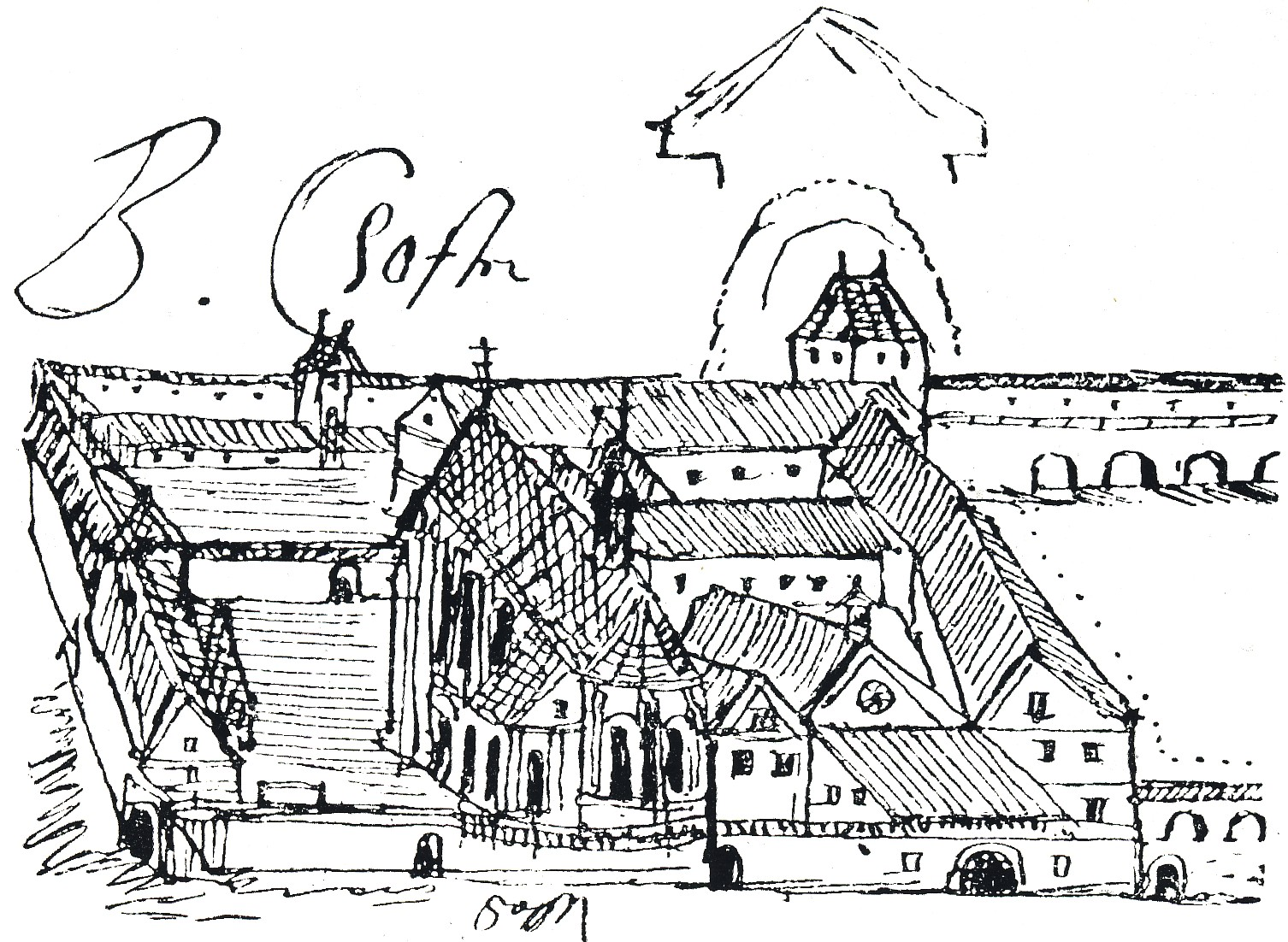 Das Franziskanerkloster in Dresden mit dem mittigen Bau der Sophienkirche.